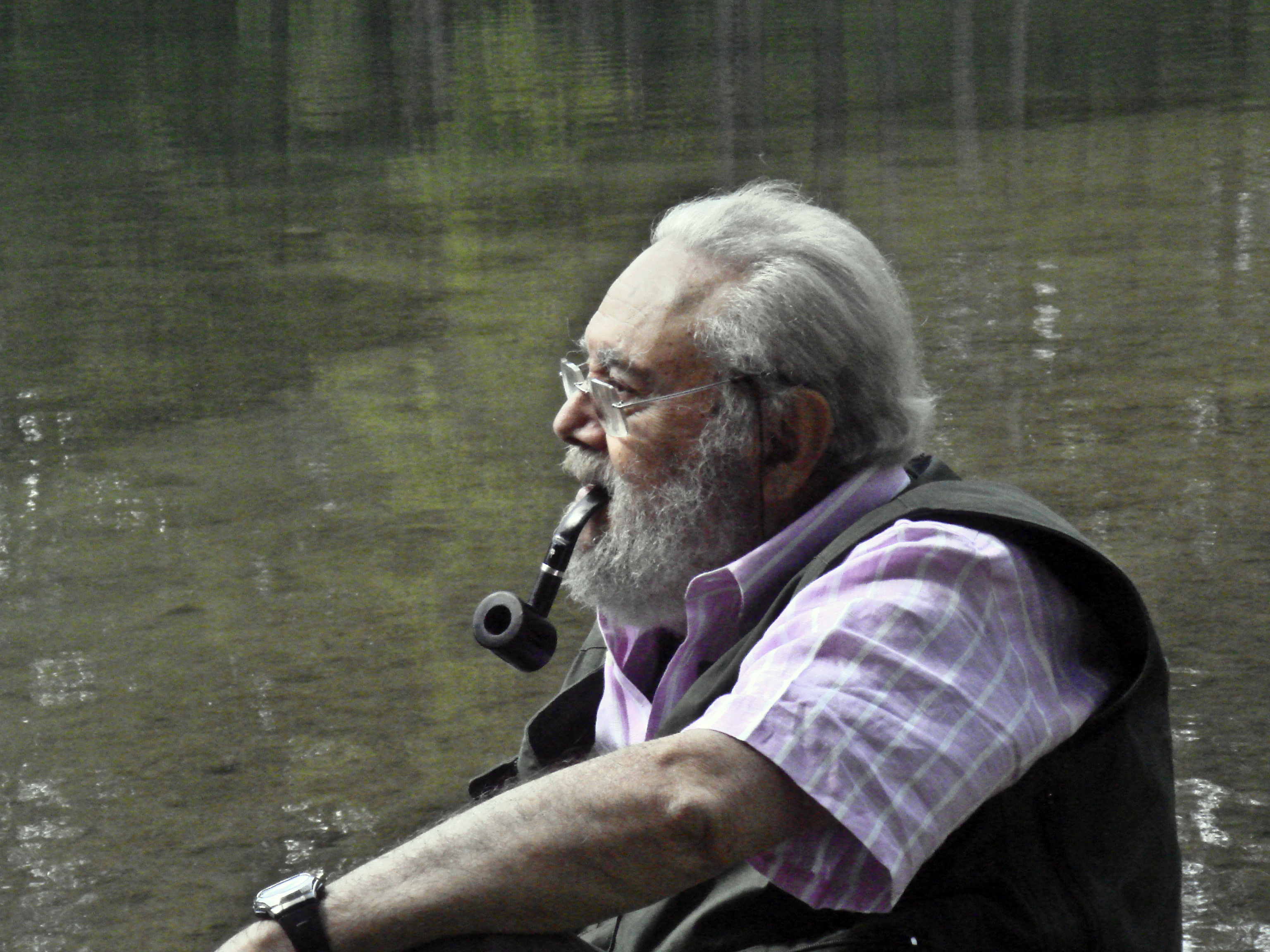 Il prof. B. Paolo Torsello